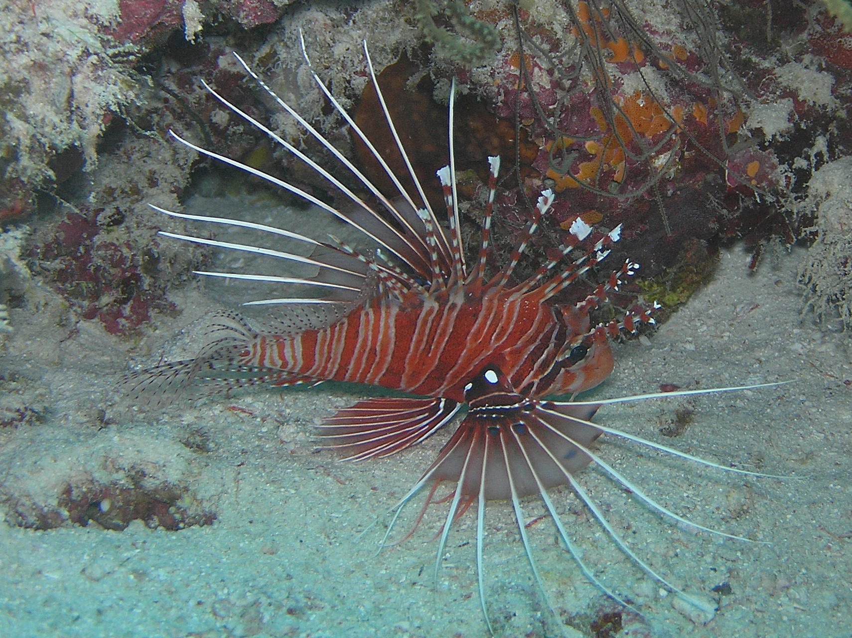 Antennen-Feuerfisch, Pterois antennata. Malediven, Veligandu, Dezember 2004